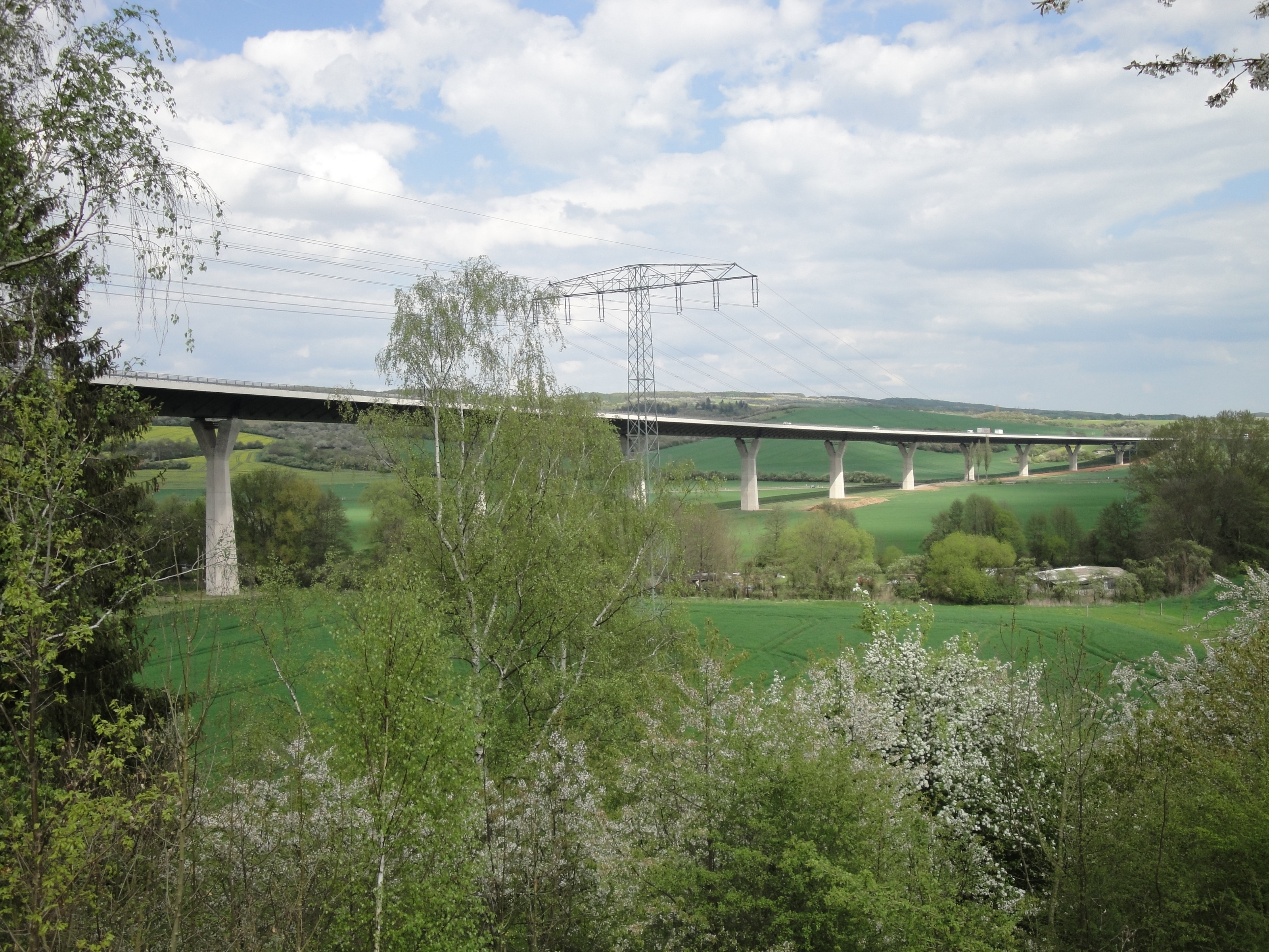 Thyratalbrücke bei Bösenrode